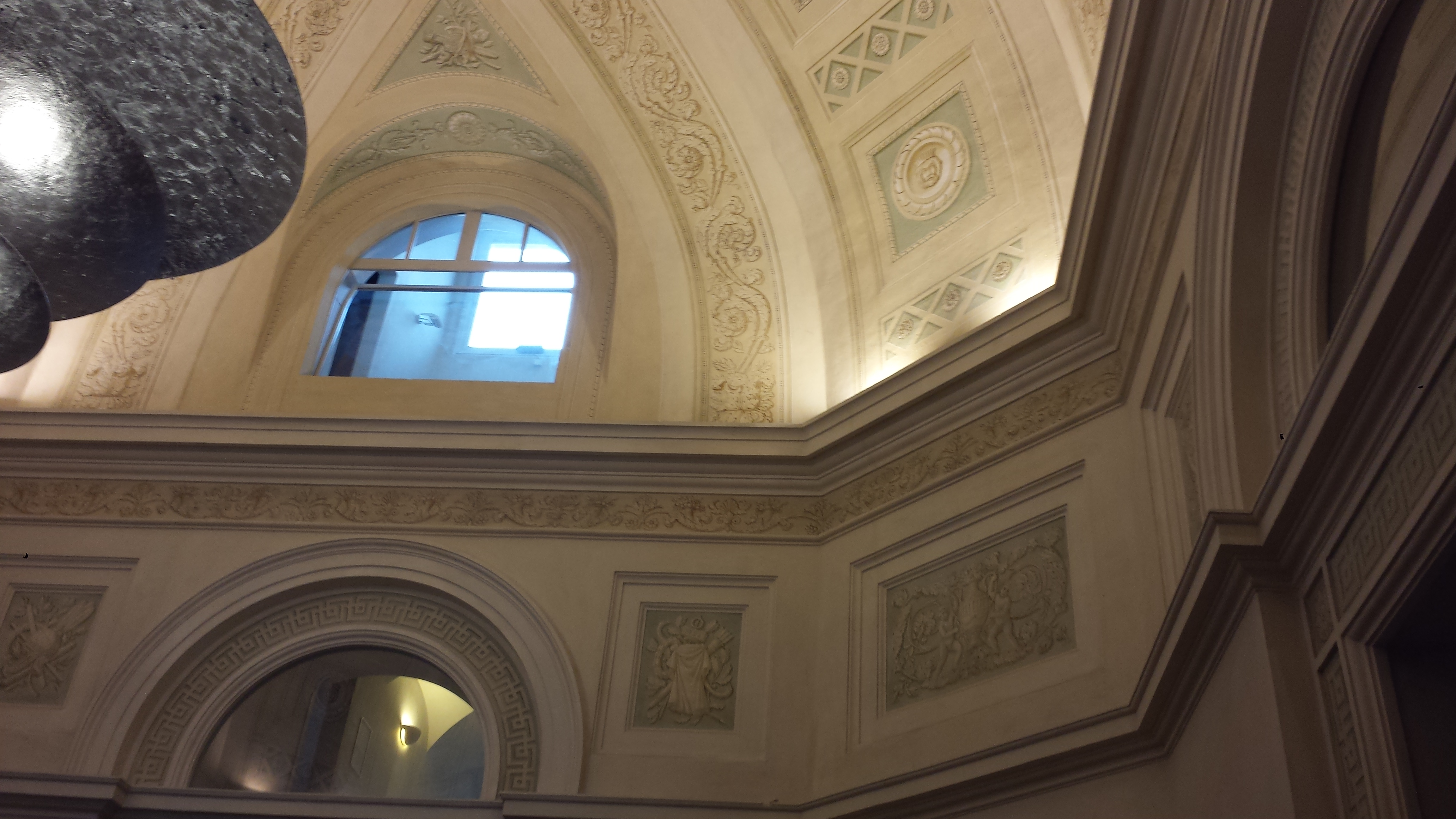 Particolare del soffitto restaurato del salone d'onore al piano nobile di Villa Favorita ad Ancona